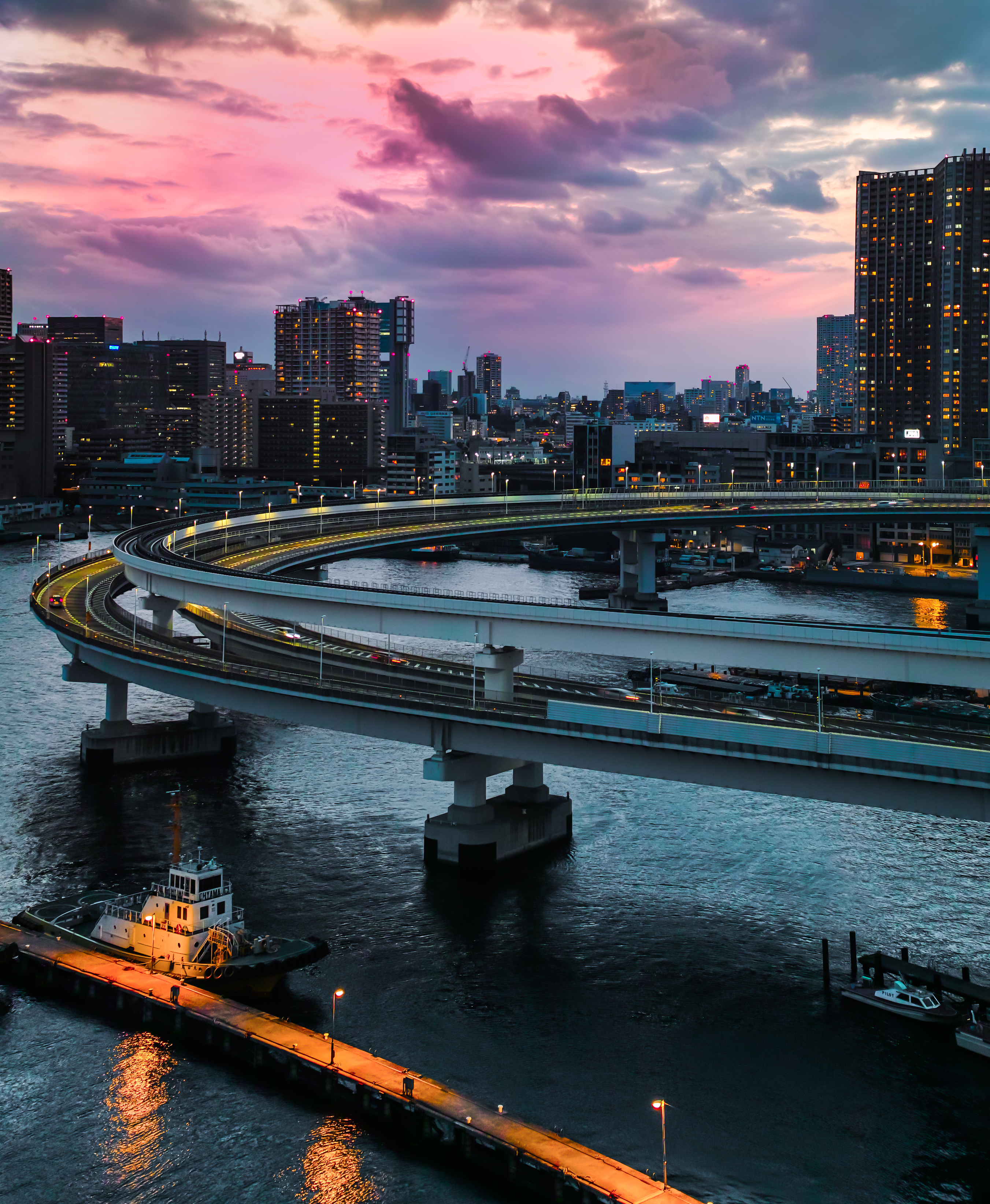 レインボーブリッジから芝浦ふ頭のループ部分を俯瞰